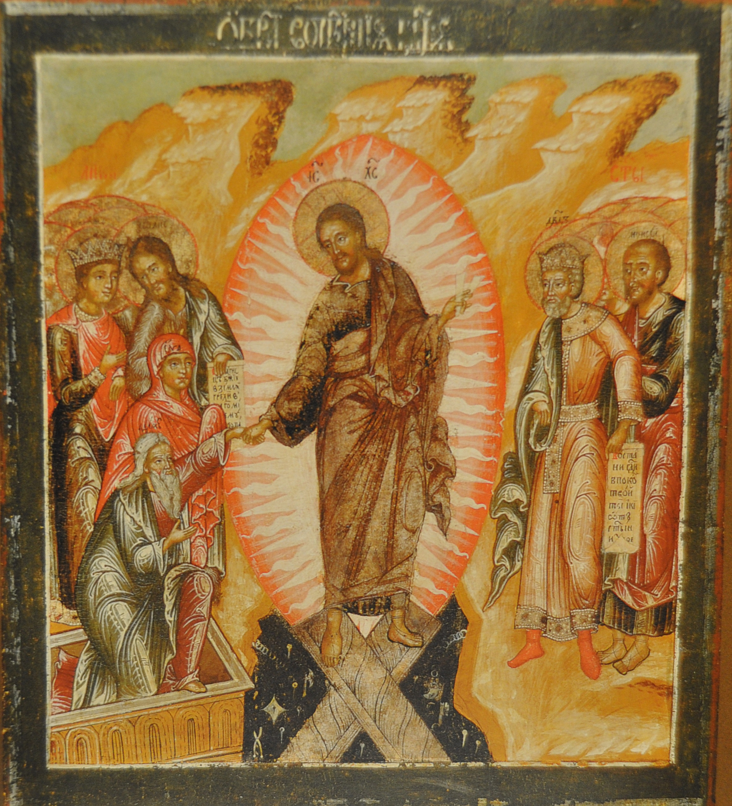 Икона Праздничного чина. Ц. Василия Блаженного (Чухчерьма). Первая треть XVIII века.